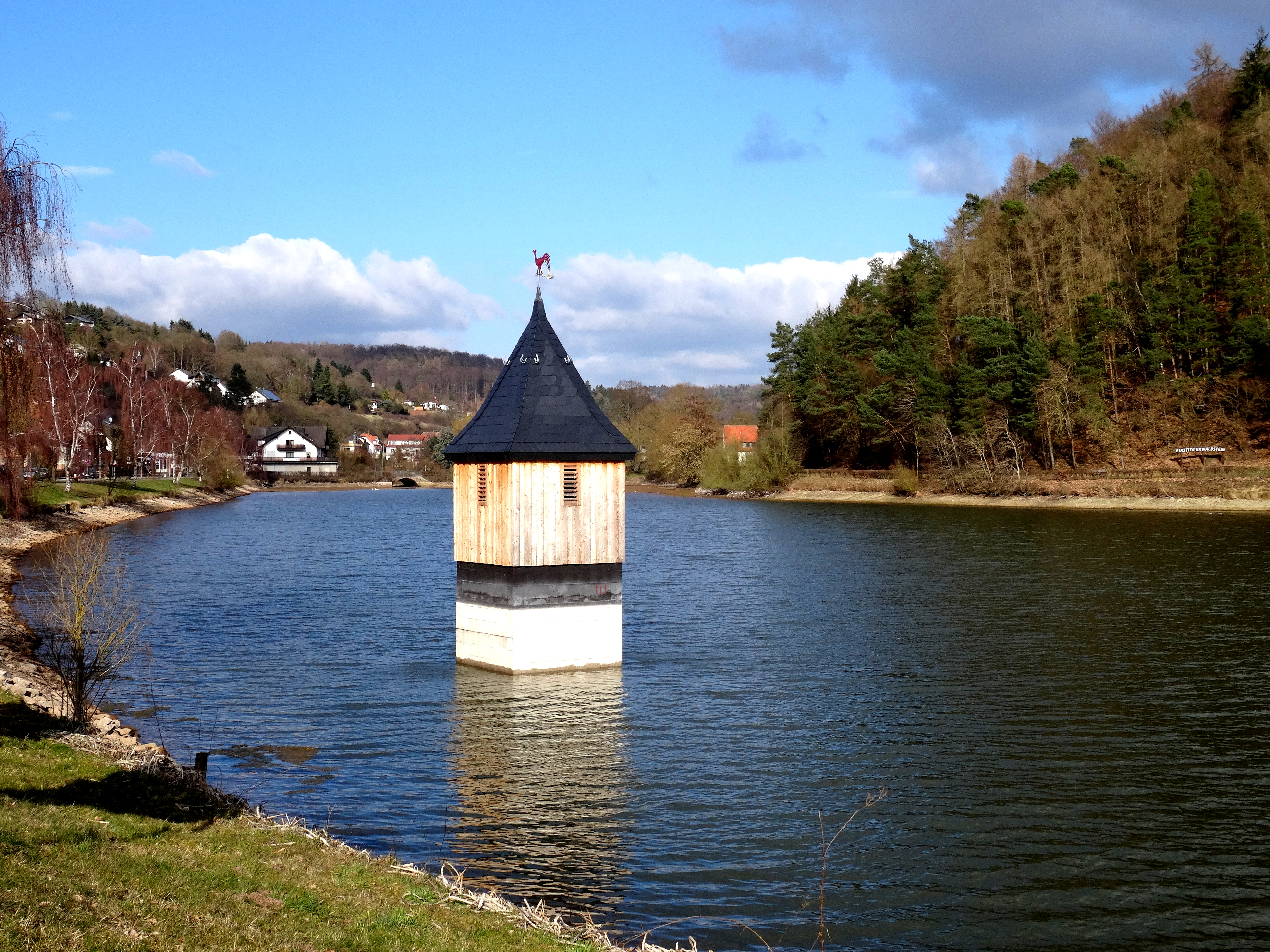 Nieder-Werbe, das Reiherbach-Vorstaubecken am Ederstausee, mit der "Kirche im See", die an die im See verschwundene ehemalige Dorfkirche erinnert.